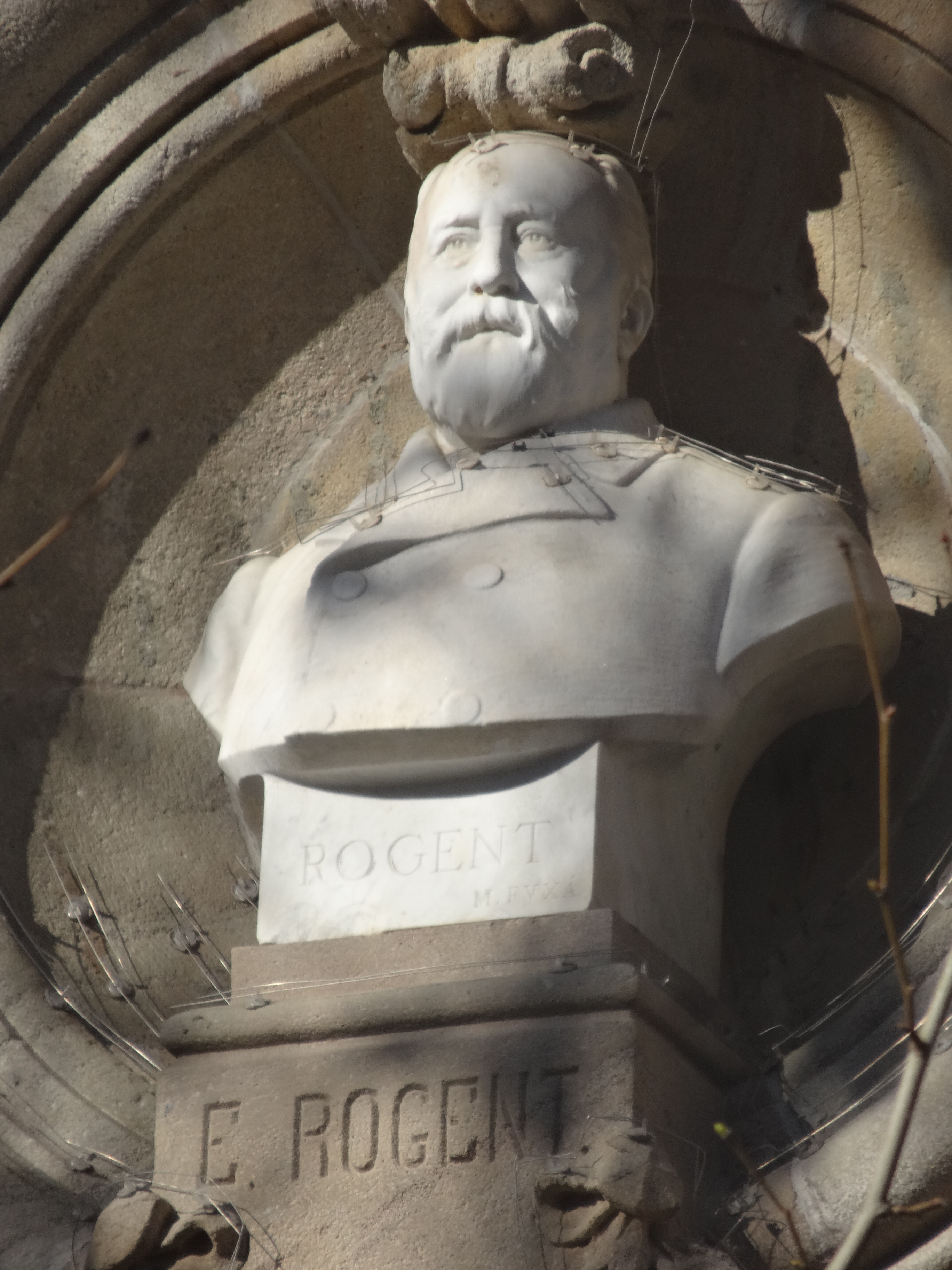 Busts a l'exterior del Palau del Parlament de Catalunya. Vistos des del zoo. Bust d'Elíes Rogent, obra de Manuel Fuxà Leal.